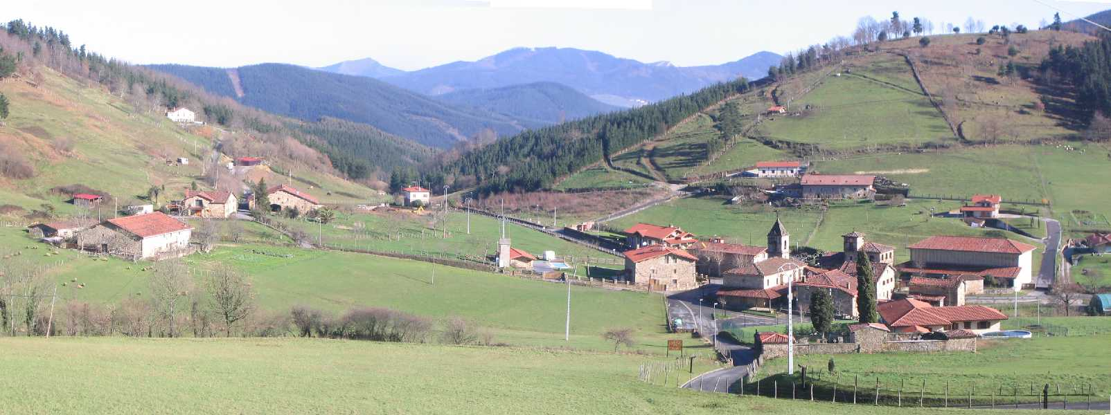 Vista general del barrio de Axpe en Achondo Vizcaya, País Vaco, España.